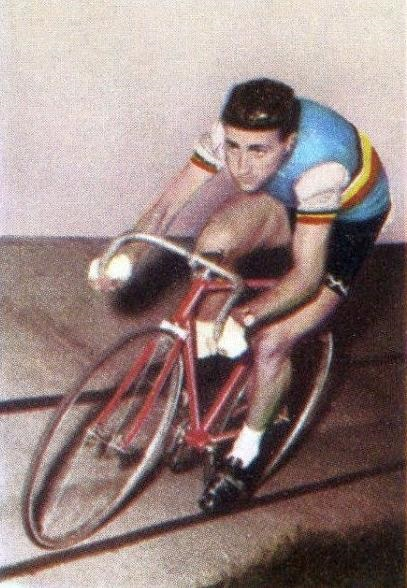 Roger Rivière en 1959 - Campioni dello Sport 1967-1968, n°292.